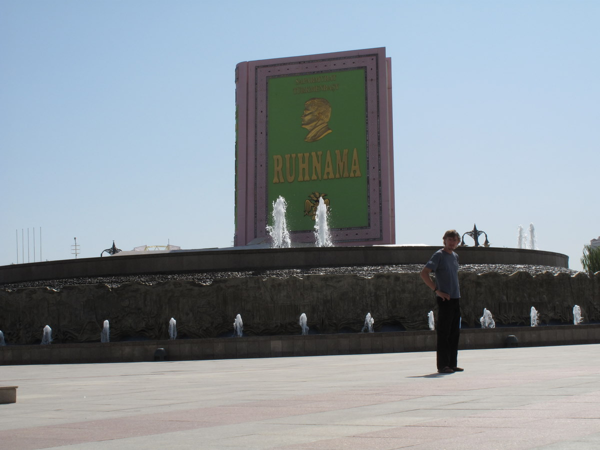 Réplica monumental del Ruhnama en Ashgabat, Turkmenistán.